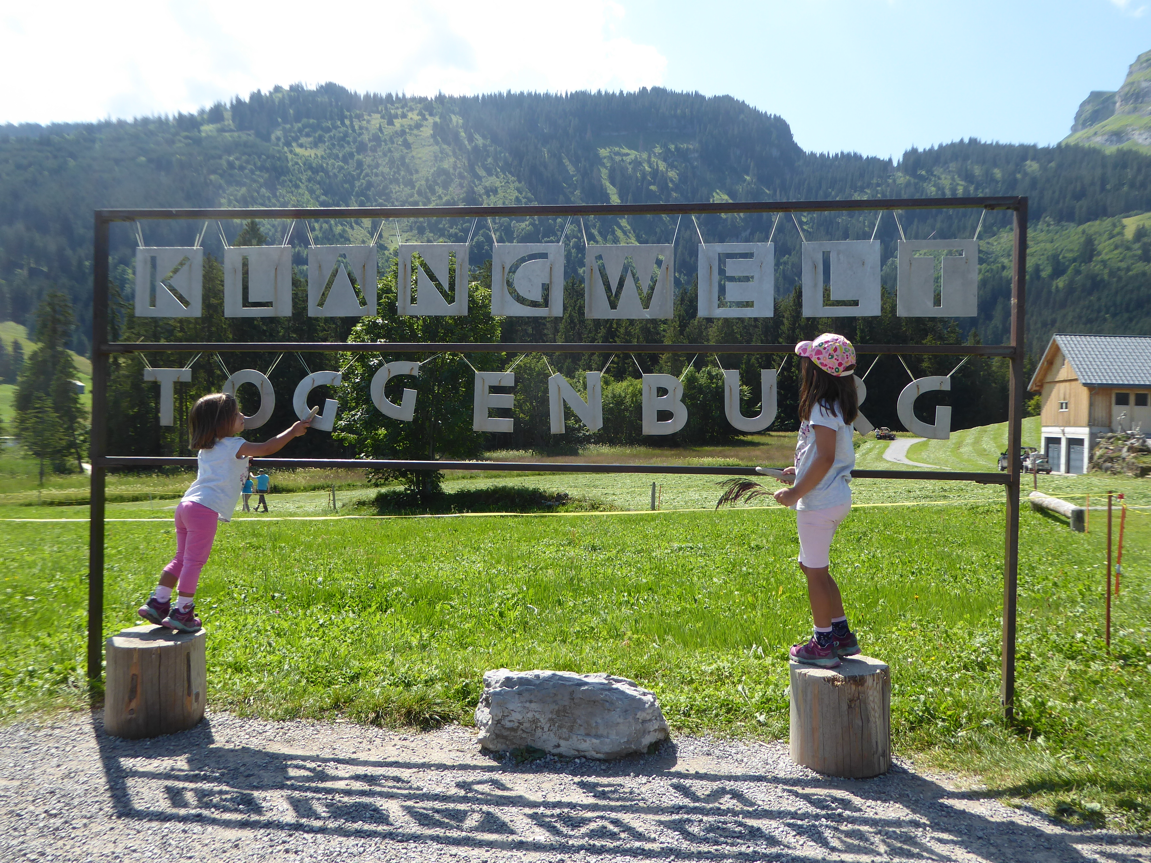 Klangstation «Klangwelt Toggenburg» beim Schwendisee